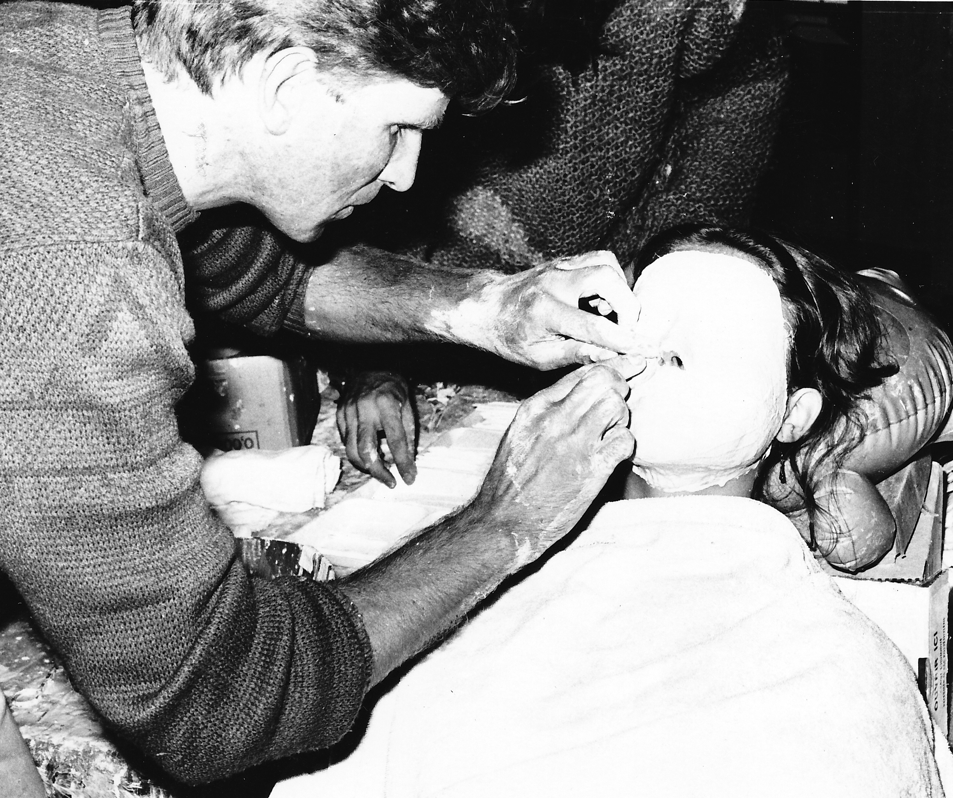 Der Künstler beim modellieren